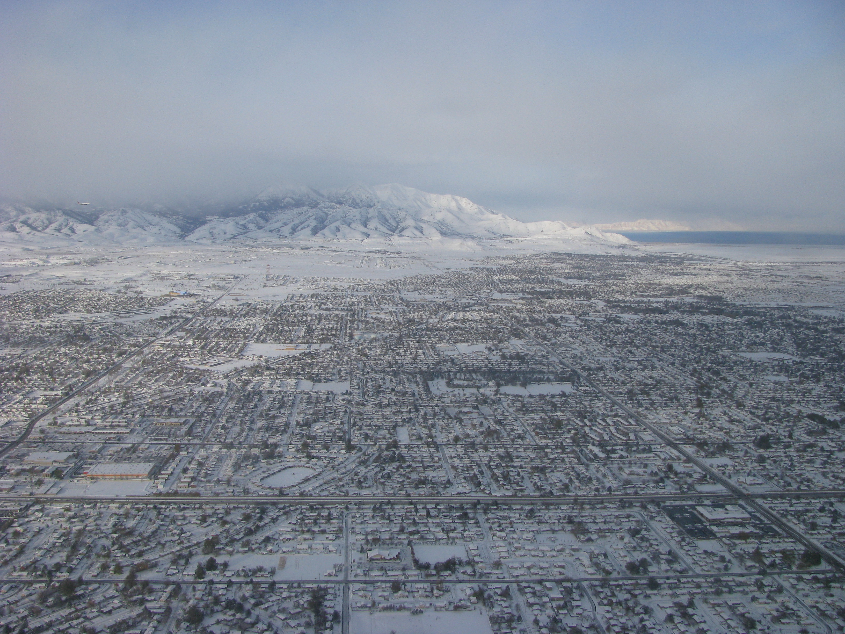 Salt Lake City